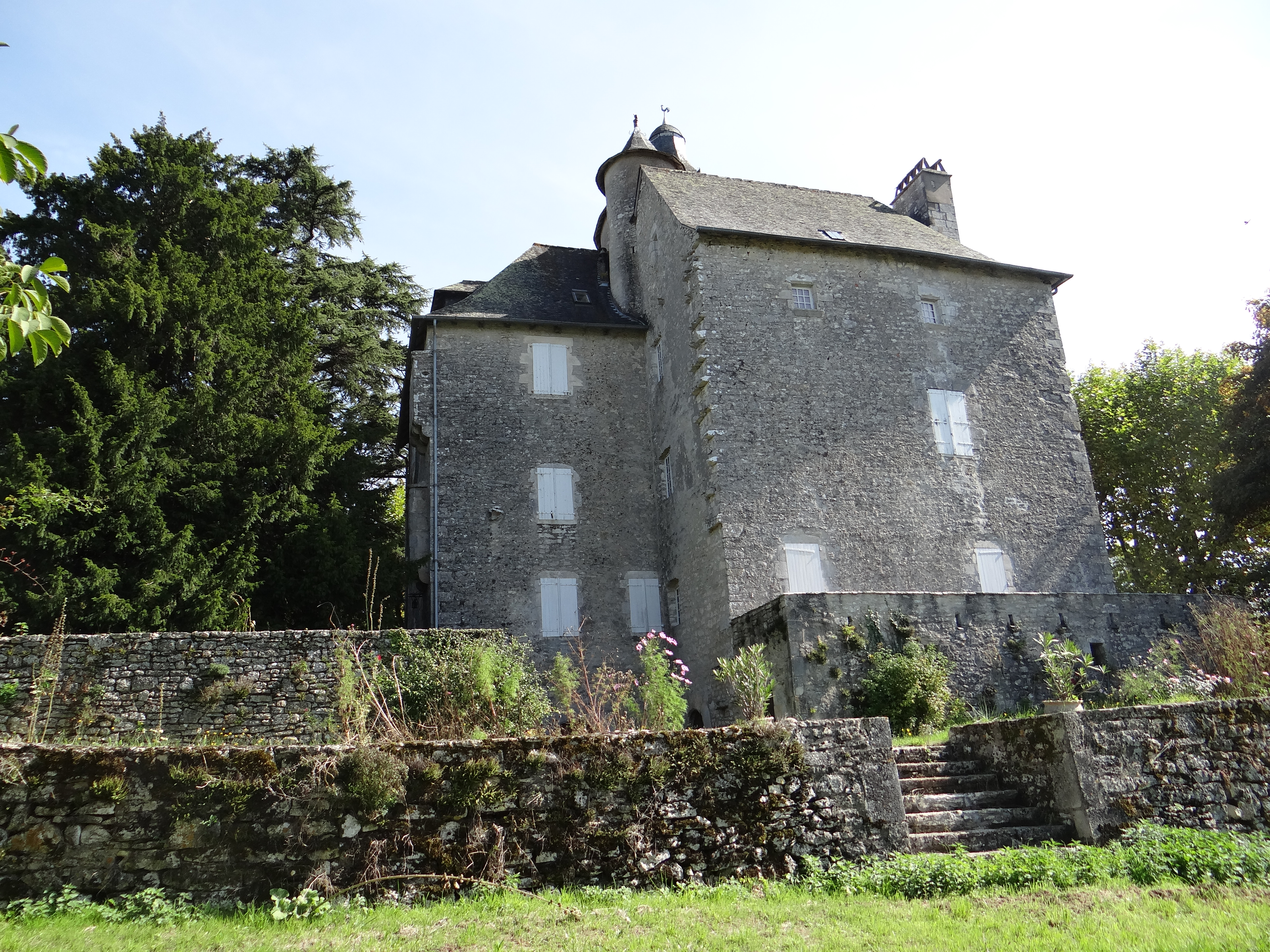 Vue de la façade ouest du Château de Mayrac (Lot, France) , fin XVe siècle